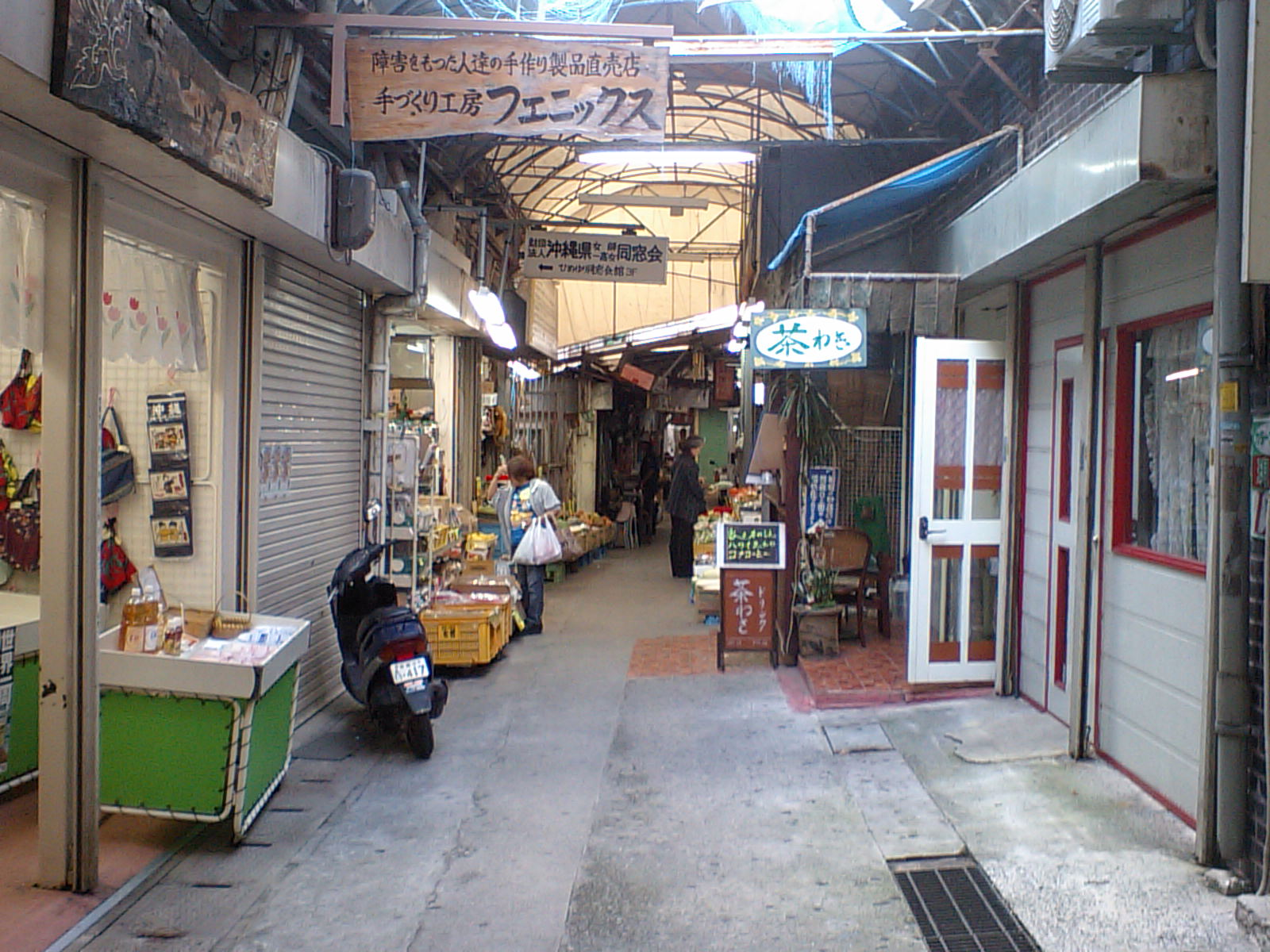 平日夕方の栄町市場